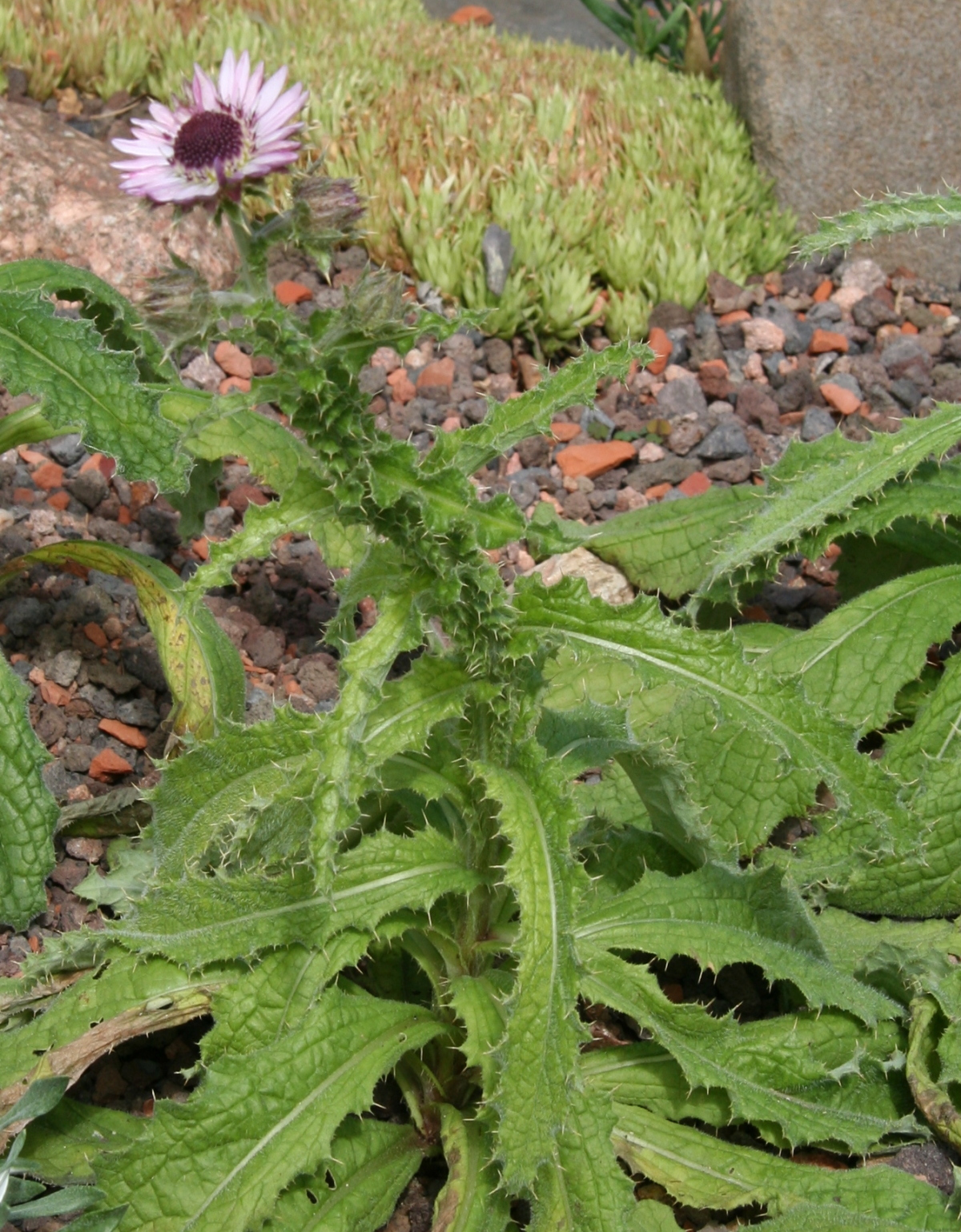 Berkheya purpurea im Botanischen Garten Dresden